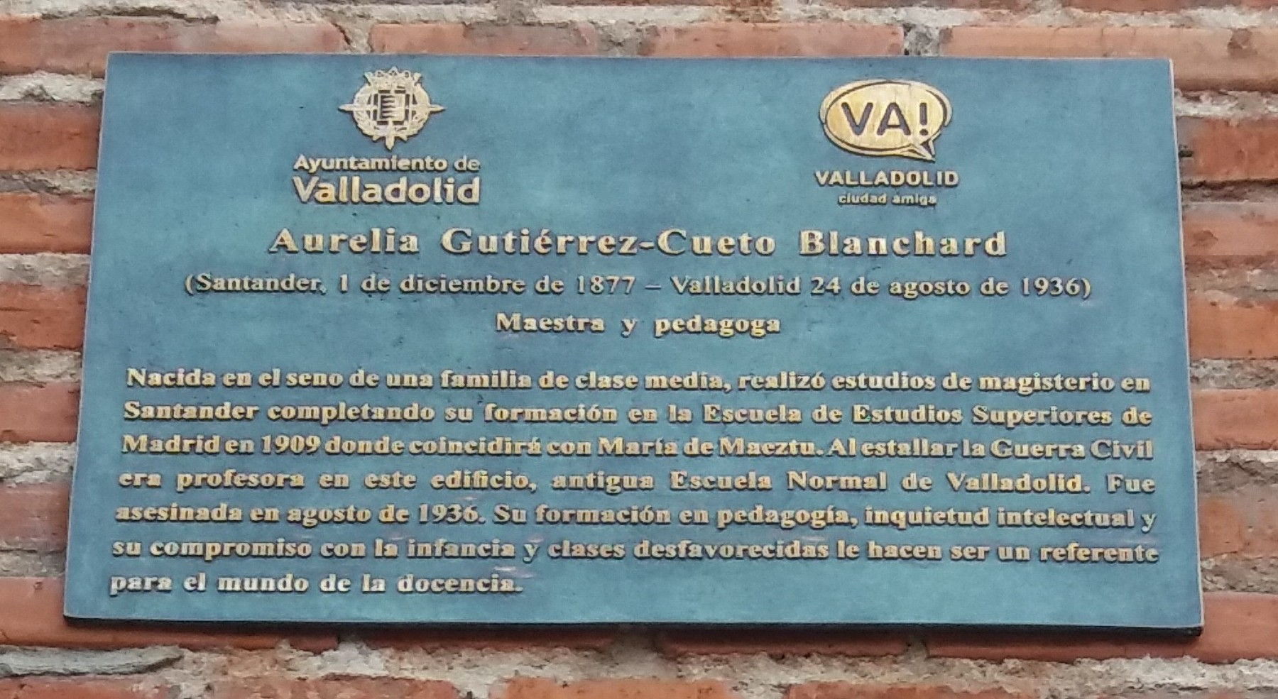 cartel de la Colección de Ciencias Naturales del MUVa (Valladolid)